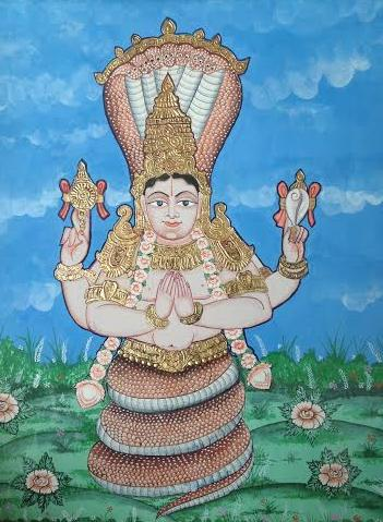 Pintura estilu Mysore de Patañjali